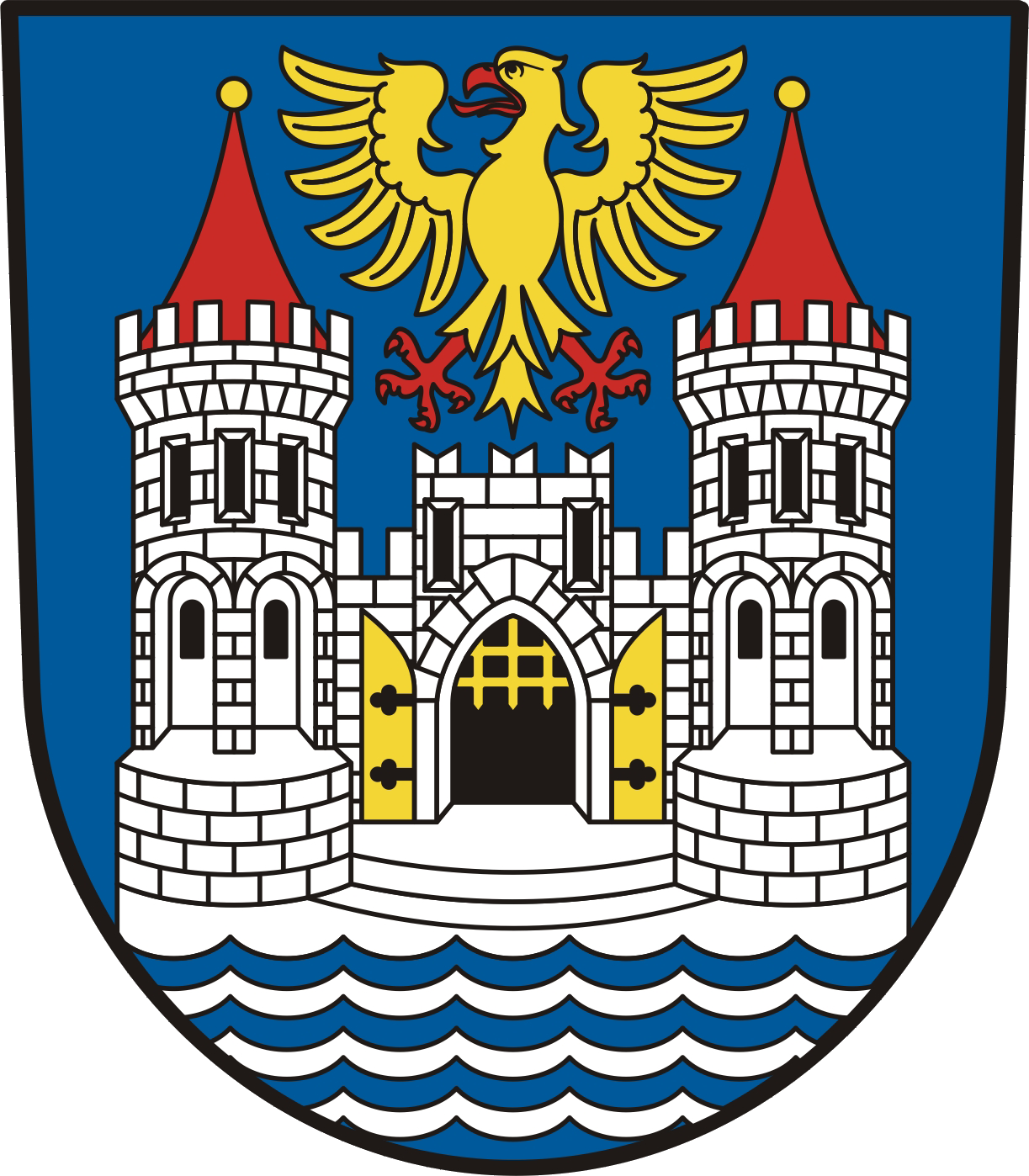 Znak města Český Těšín